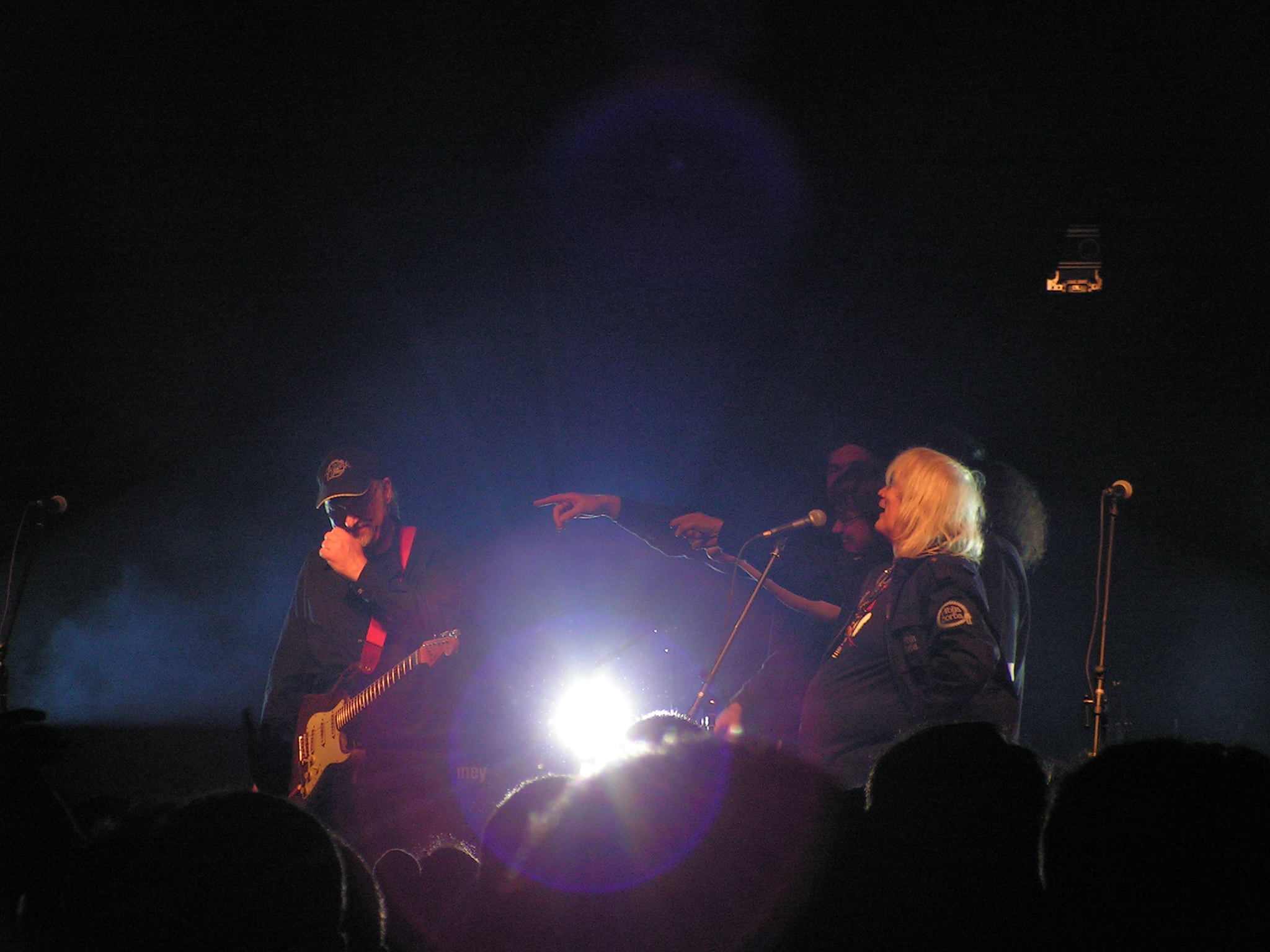 Srpski (latinica): Riblja čorba, koncert u Kraljevu, Dom društvenih organizacija, 24.12.2011.godine.